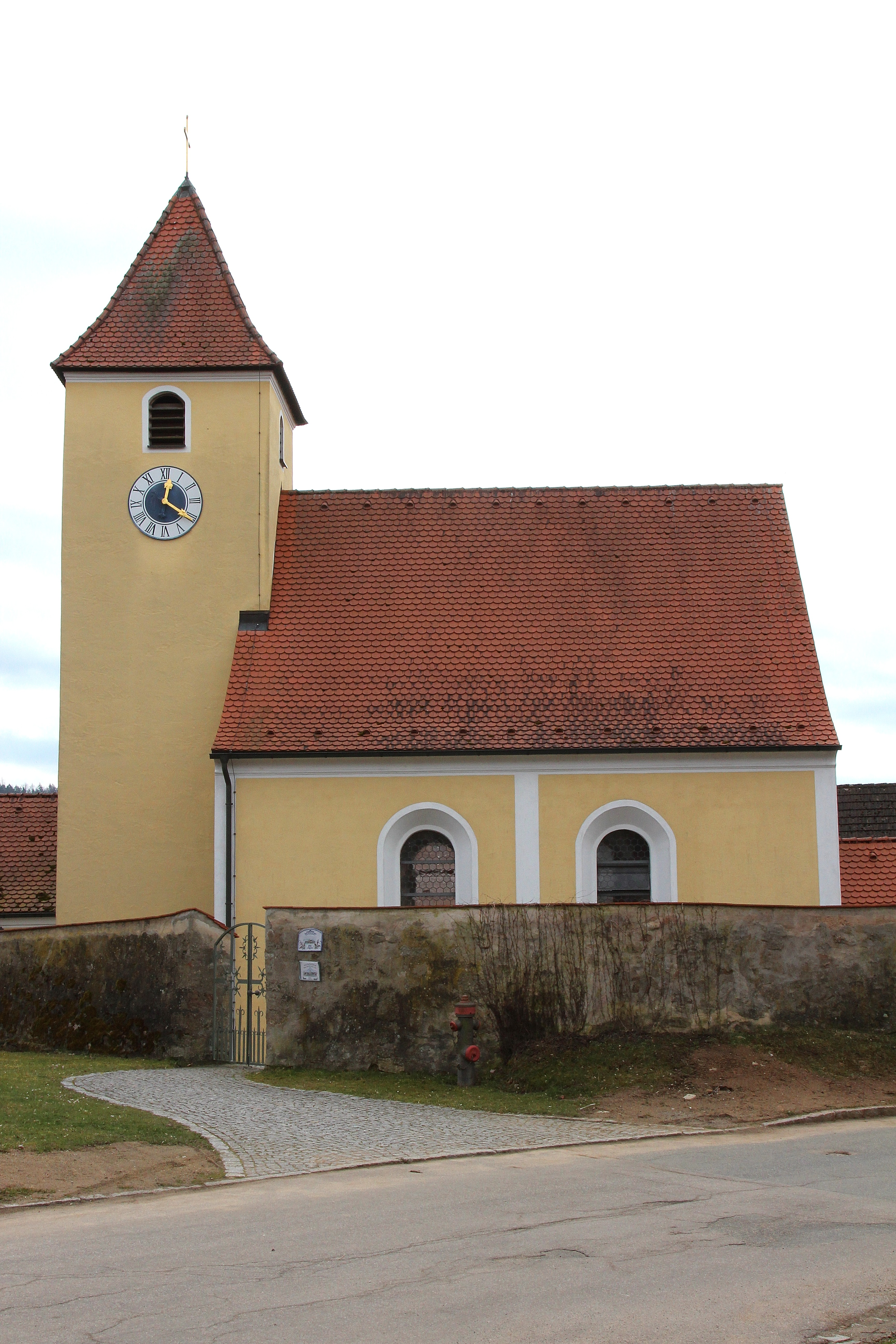 Reisach, Kirche Peter und Paul; Gemeinde Trausnitz, Landkreis Schwandorf, Oberpfalz, Bayern